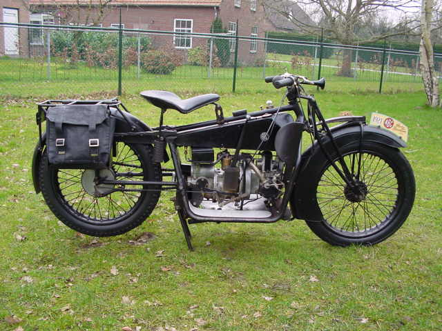 Toestemming van Yesterdays Antique Motorcycles